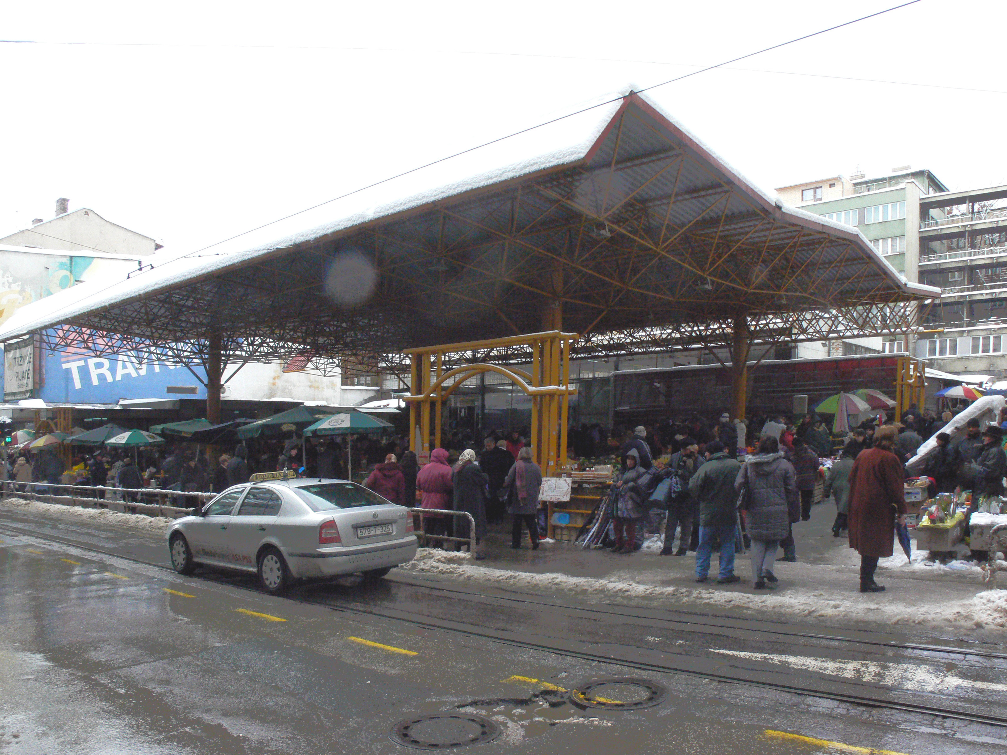 Sarajevo in Winter. Sarajevo market.